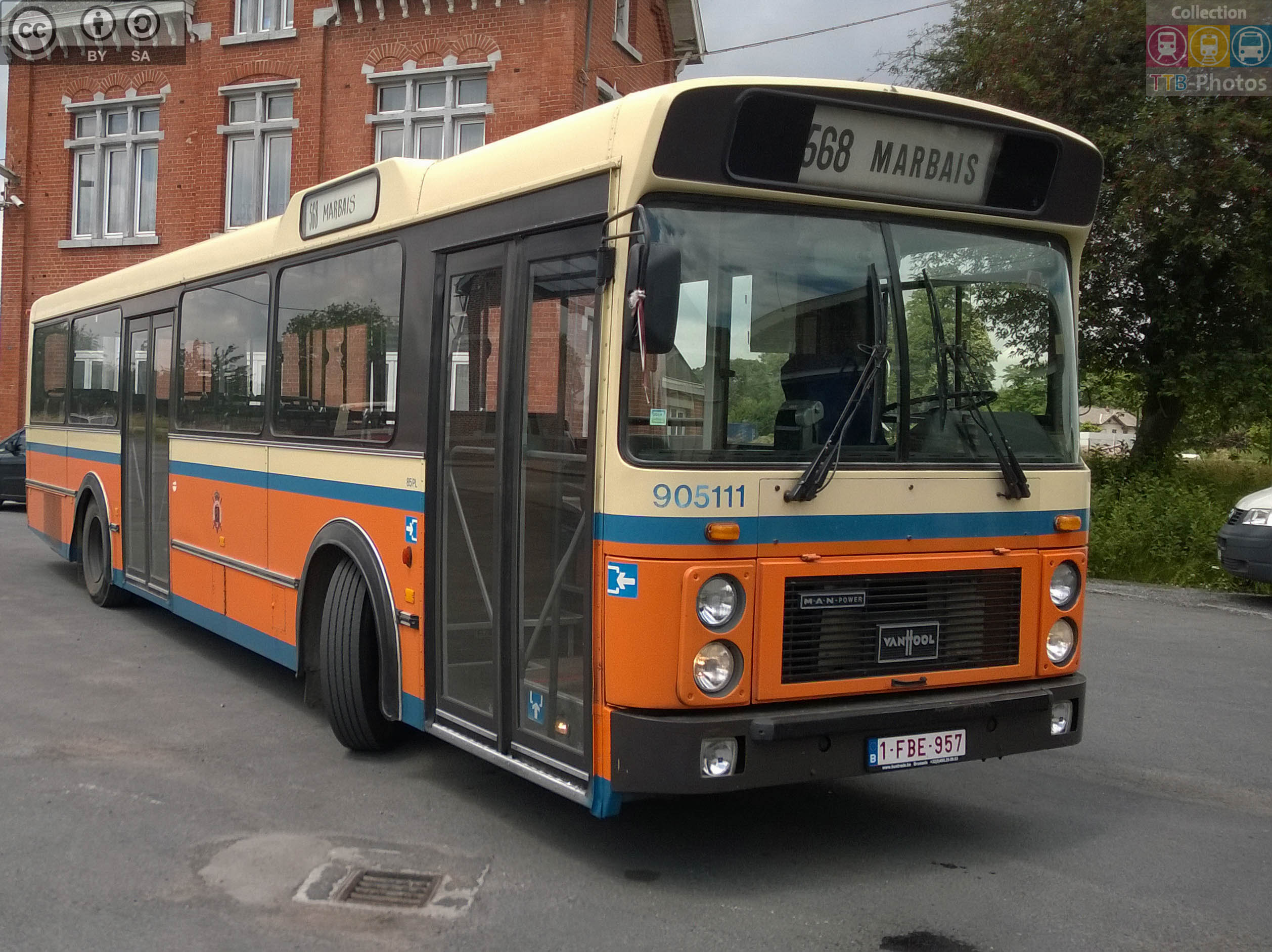 F. Cardona et Deltenre 905111 - Ligne 568 vers Marbais Casteau, dépôt TEC - 14 juin 2014 Van Hool A120P MAN (05/08/1984)